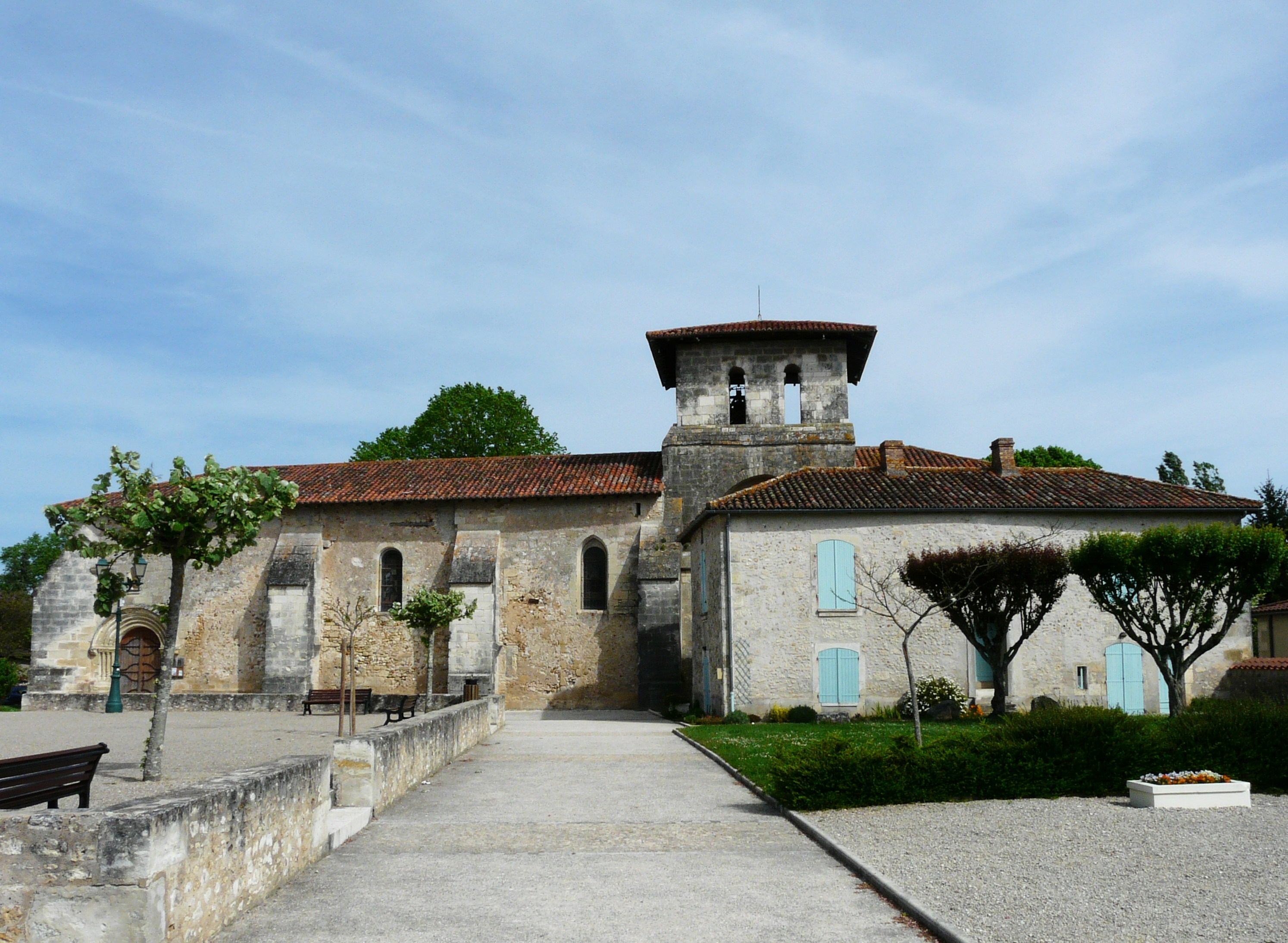 Église Notre-Dame de l'Assomption, Atur, Dordogne, France